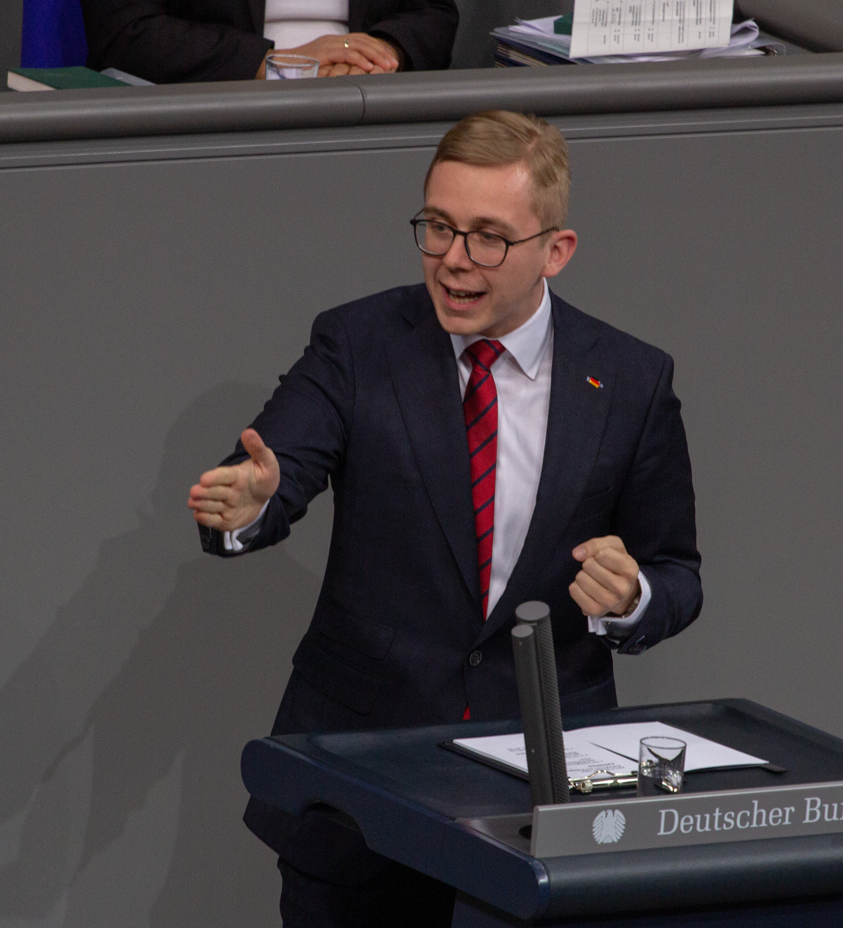 Philipp Amthor, Mitglied des Deutschen Bundestages, während einer Plenarsitzung am 11. April 2019 in Berlin.